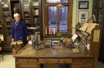 Wilhelm Ostwalds Labortisch im Landsitz Energie